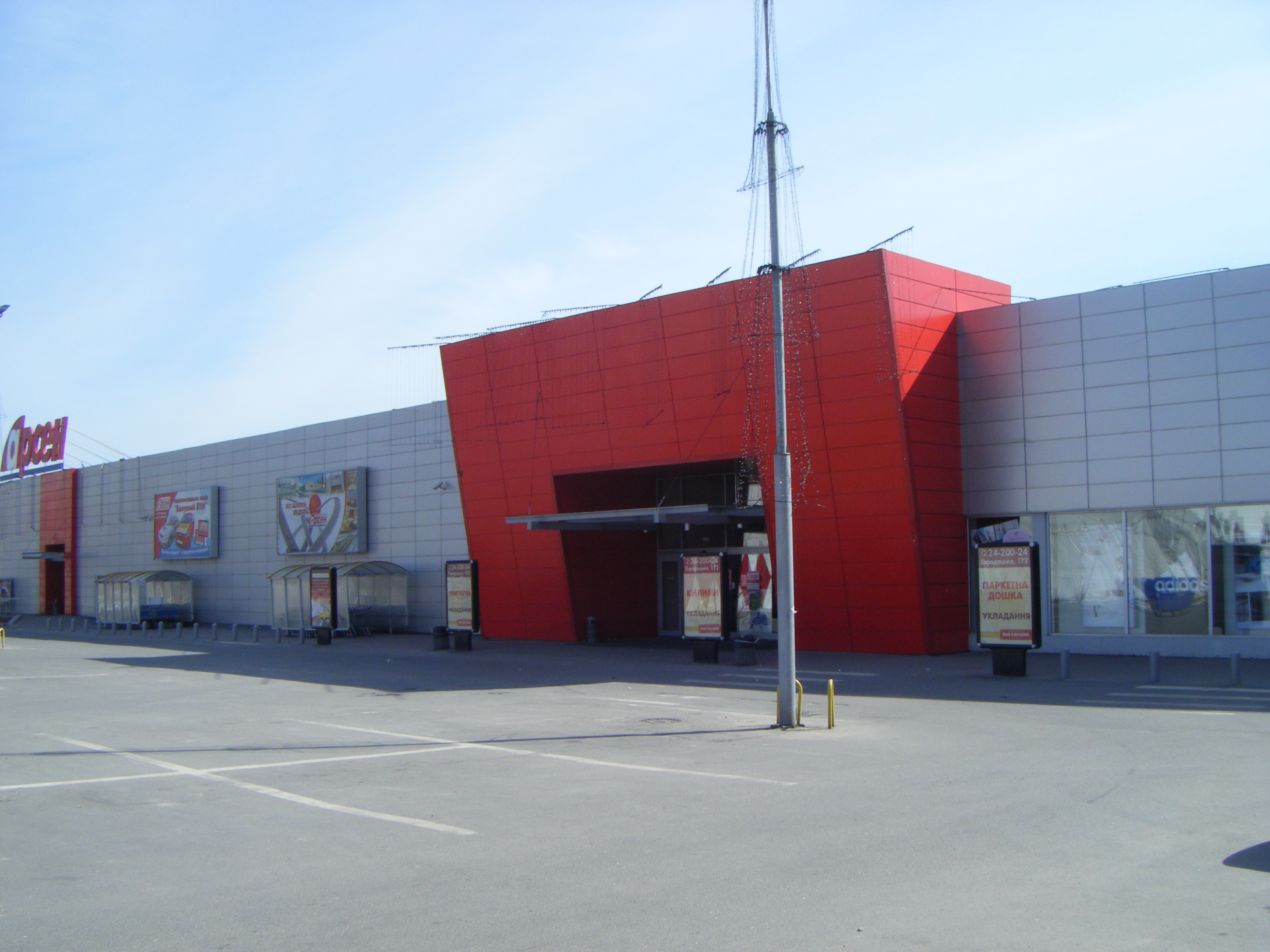 Супермарекет Арсен